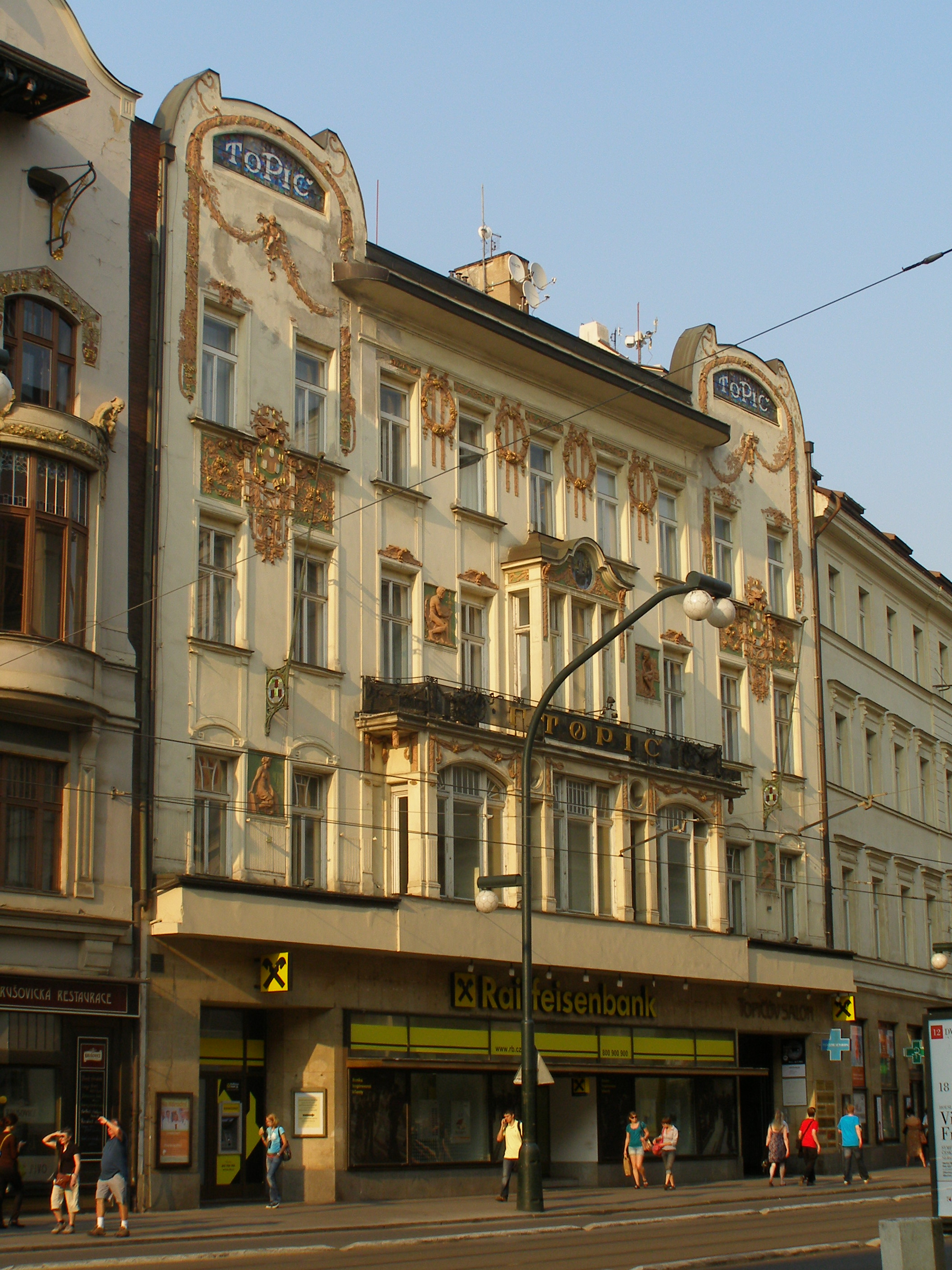 Nakladatelství Topičův dům (Staré Město), Praha 1, Národní 1010/9, Staré Město